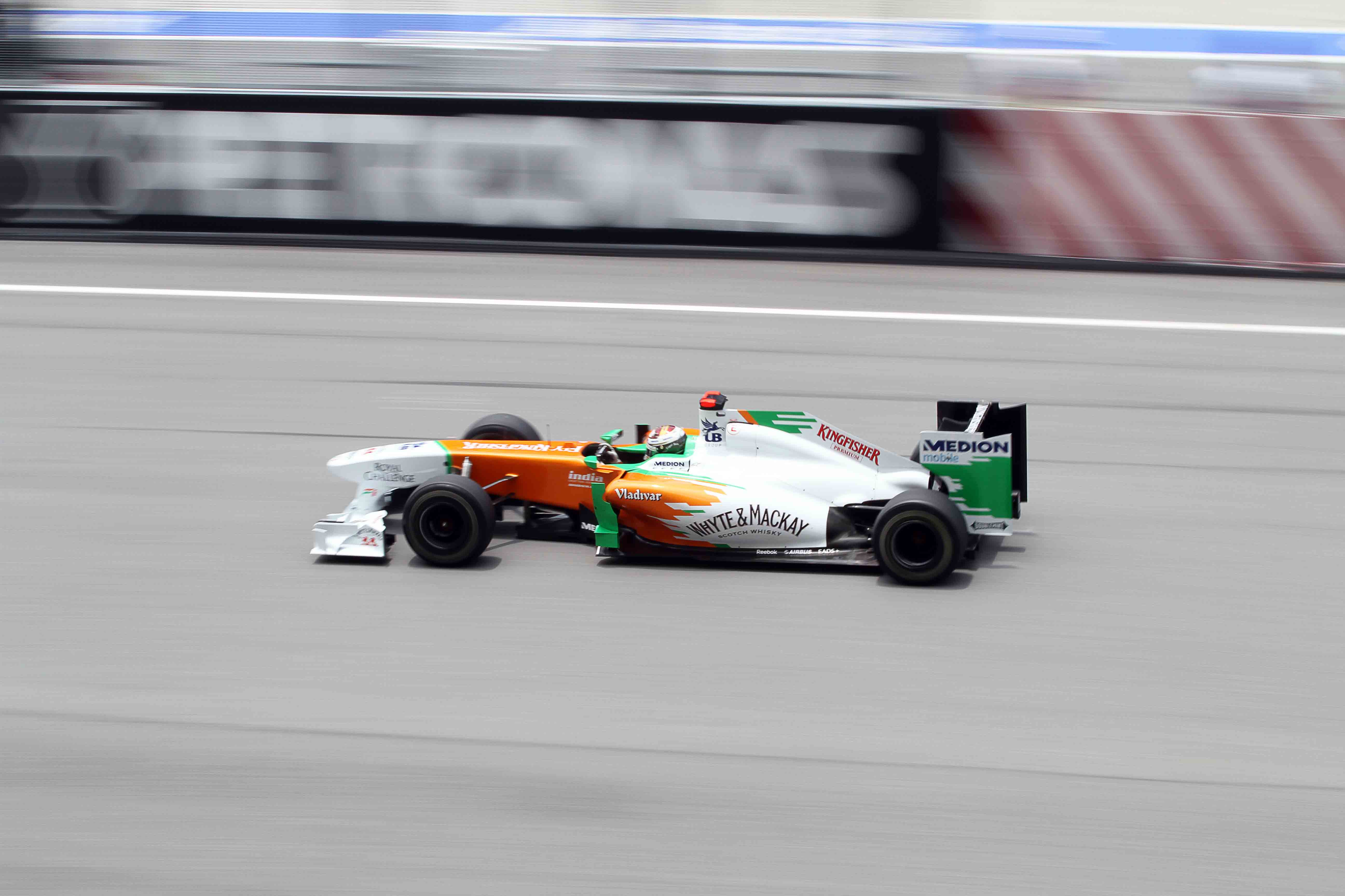 Malaysia F1 GP 2011